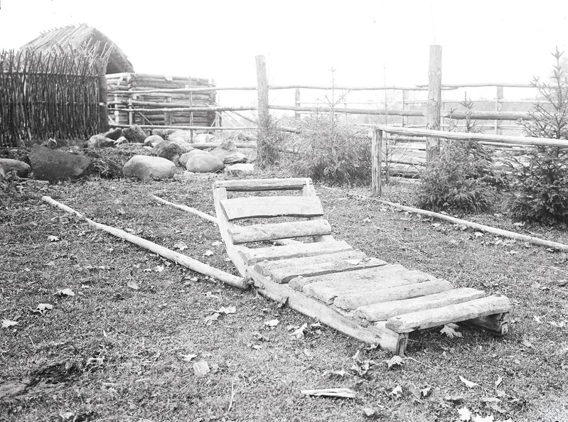 Kiviveo regi rautatud jalastega